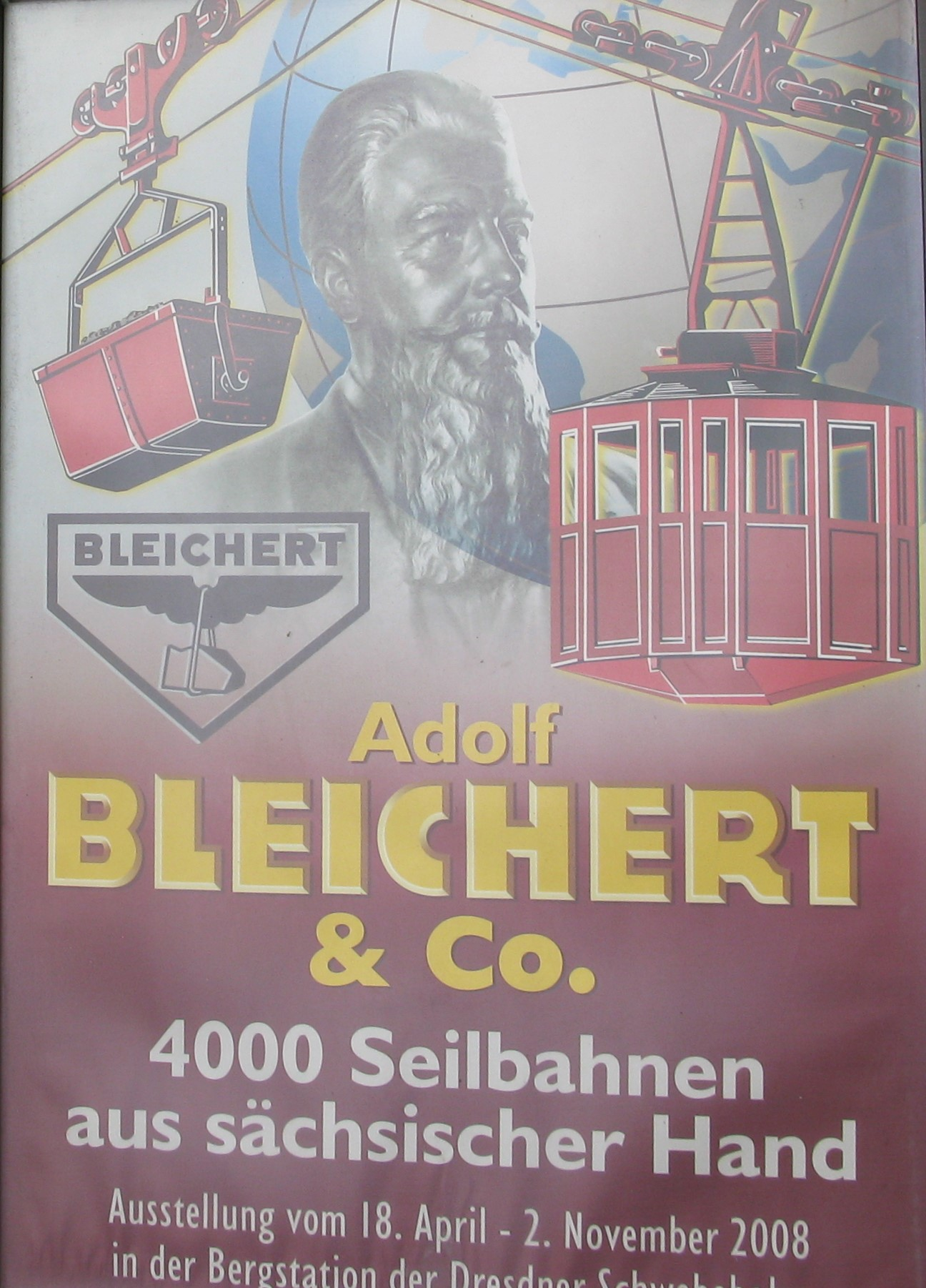 Ausstellungsplakat Bleichert & Co., Dresden 2008